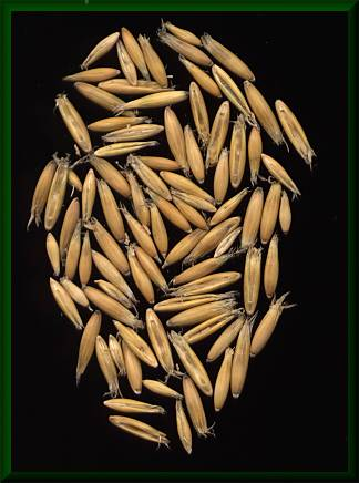 Körner des Saat-Hafers (Avena sativa)